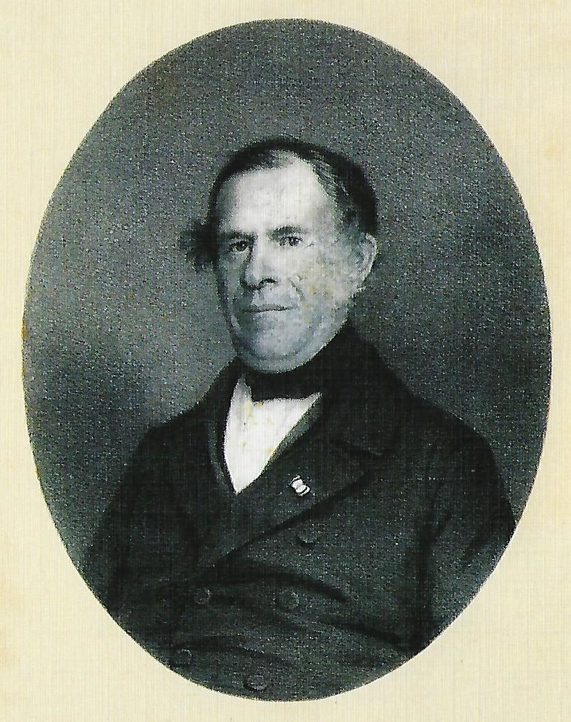 Porträtfotografie von Carl Päpke.